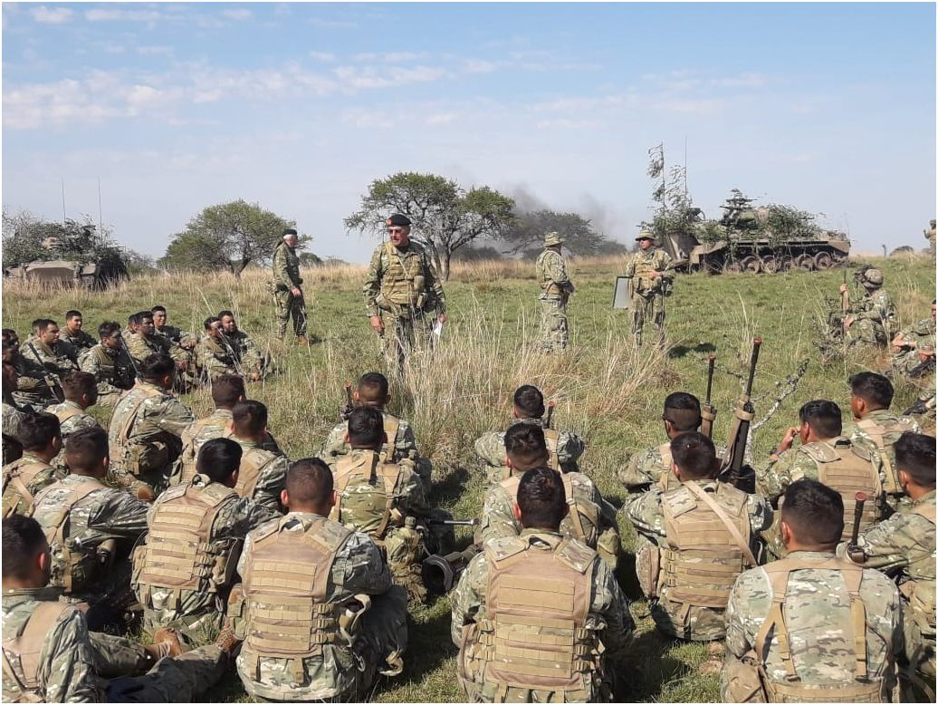 II Brigada Blindada, 1.ª División de Ejército. Ejercicio Timbú. Campo de Instrucción General Ávalos.